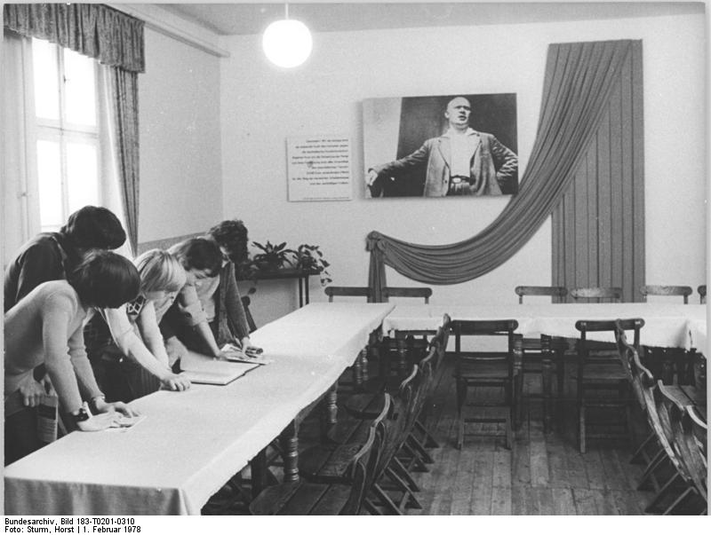 Niederlehme, Jugendstunde, Thälmann-Gedenkstätte Ziegenhals Zum Beitrag: Jugendstunde in der Thälmann-Gedenkstätte-Am Ort der illegalen Tagung des ZK der KPD vor 45 Jahren in Ziegenhals ADN-Z-Sturm-1.2.1978 Jugendweiheteilnehmer der Reinhold-huhn-Oberschule Berlin-Mitte in der Thälmann-Gedenkstätte Ziegenhals (Bze. Potsdam). In diesem Raum trafen sich am 7.Februar 1933, acht Tage nach der Machtergreifung der Faschisten in Deutschland, 35 Mitglieder des ZK der KPD zu einer illegalen Tagung. Ernst Thälmann sprach zu seinen engsten Kampfgefährten. Seit die Thälmann-Gedenkstätte am 7. Februar 1953 eröffnet wurde, kamen Hunderttausende -allein im Jahre 1977 waren es nahezu 63000 aus 39 Ländern-, um sich mit Leben und Kampf Thälmanns vertraut zu machen, des unerschrockenen Kommunisten zu gedenken. (Bitte beachten Sie hierzu auch T0201-308N, 309N, 311N, 312N!)